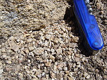 granit örnek